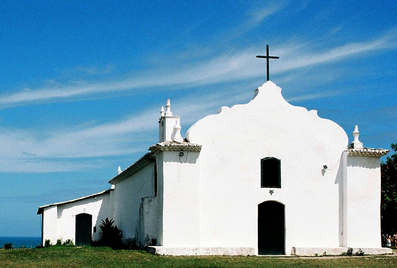 Uma igrejinha em Porto Seguro, Bahia, Brasil.